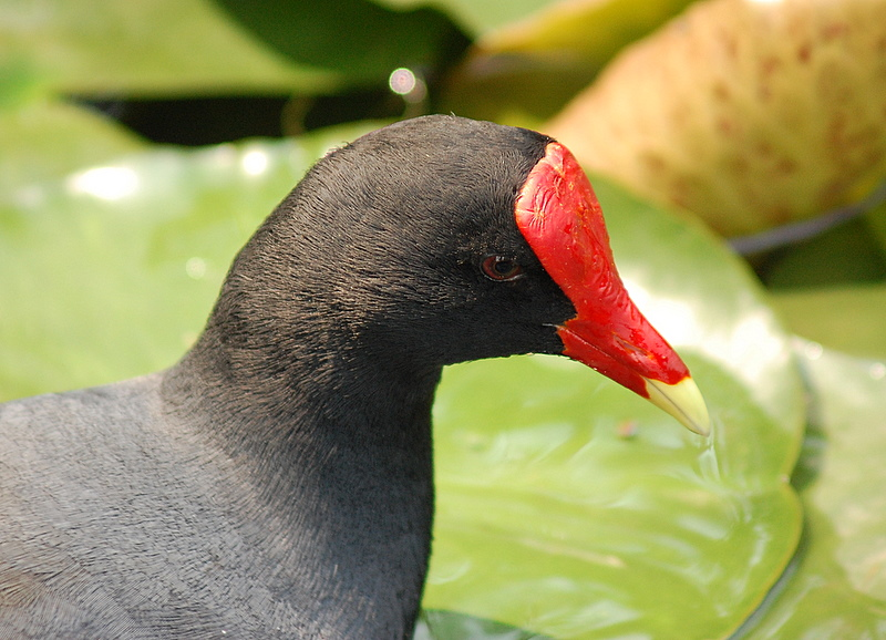 Gallinula galeata, Jardim Botânico de São Paulo, Brasil